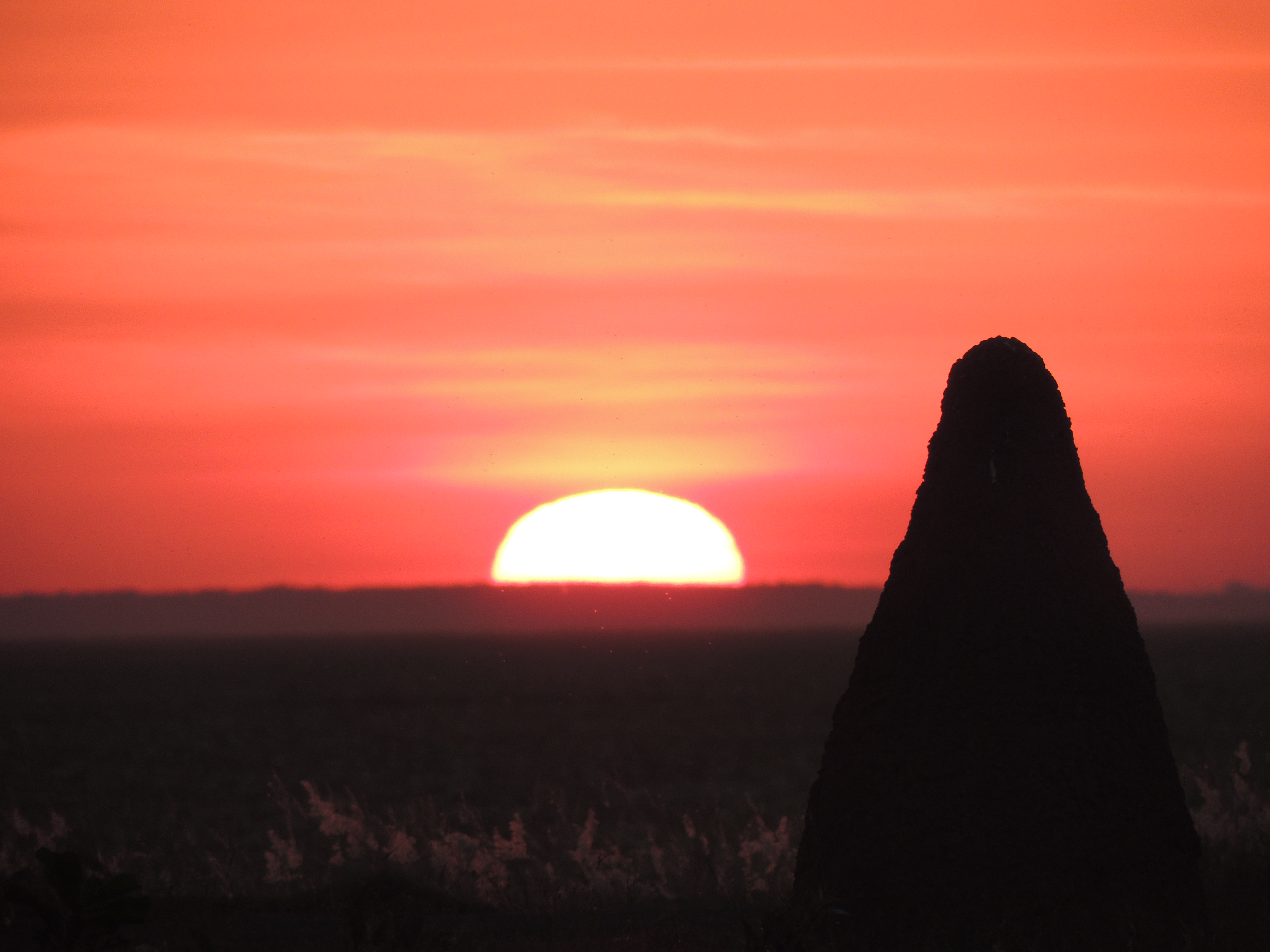 Foto registrada no Portão do Jacubá, no Parque Nacional das Emas - Goiás - Brasil.